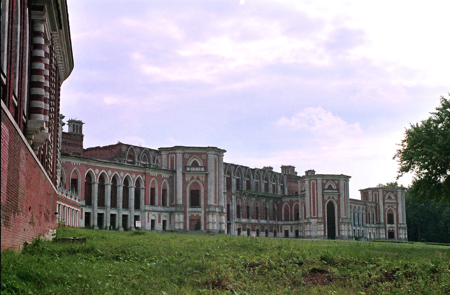 Руины Большого Царицынского дворца в 2003 году.